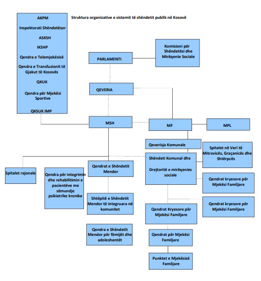 Ketu gjeni strukturen organizative te sistemit te shendetit publik ne Kosove.